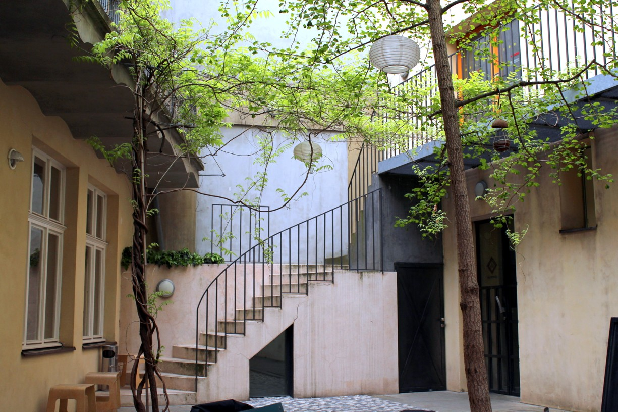 Vnitroblok paláce Langhans